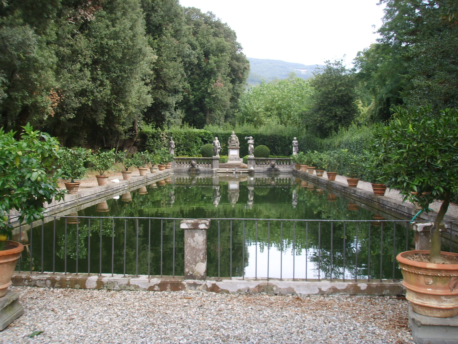 Villa torrigiani di lucca, peschiera